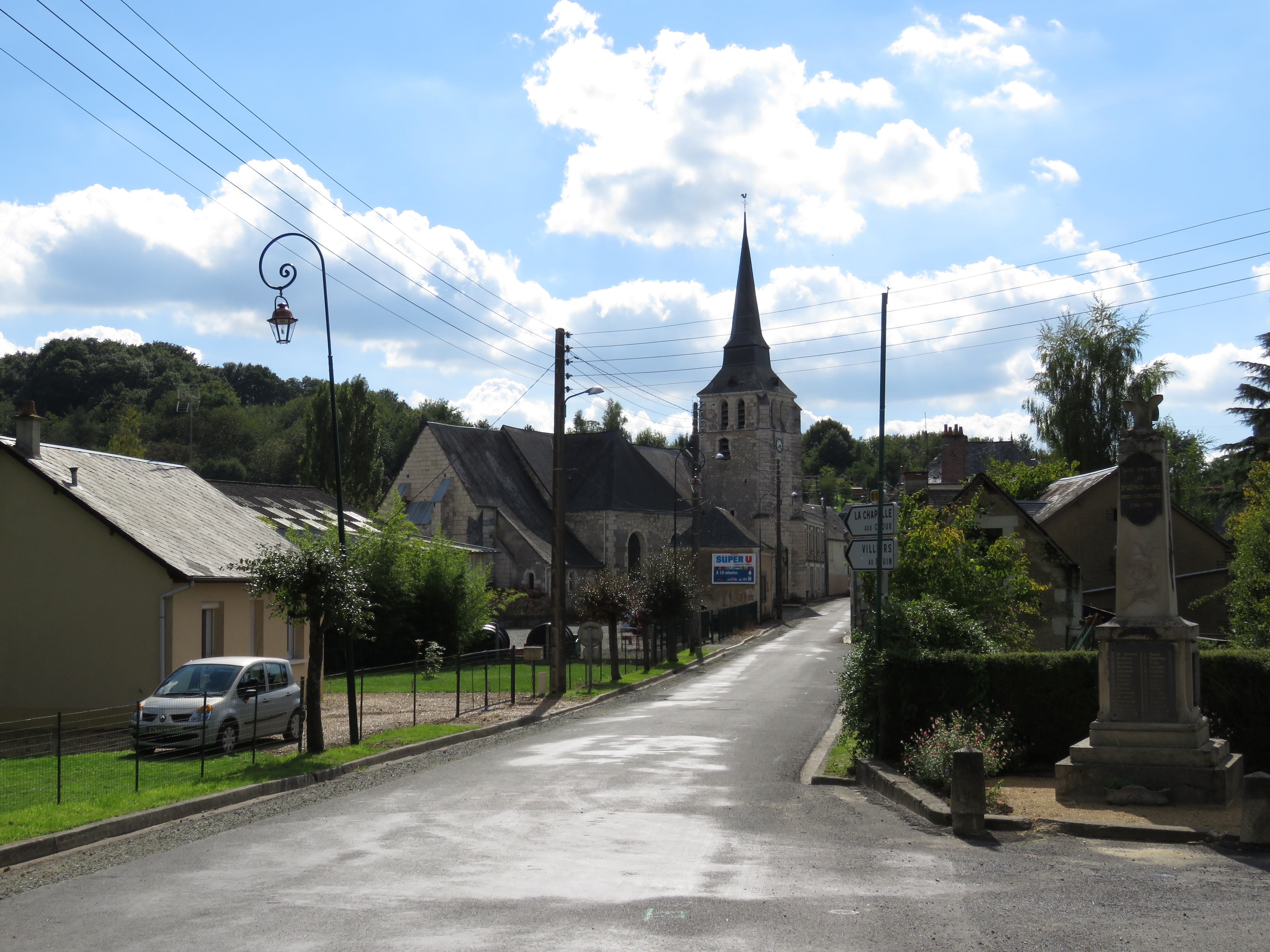 Église de Saint-Germain-d'Arcé.